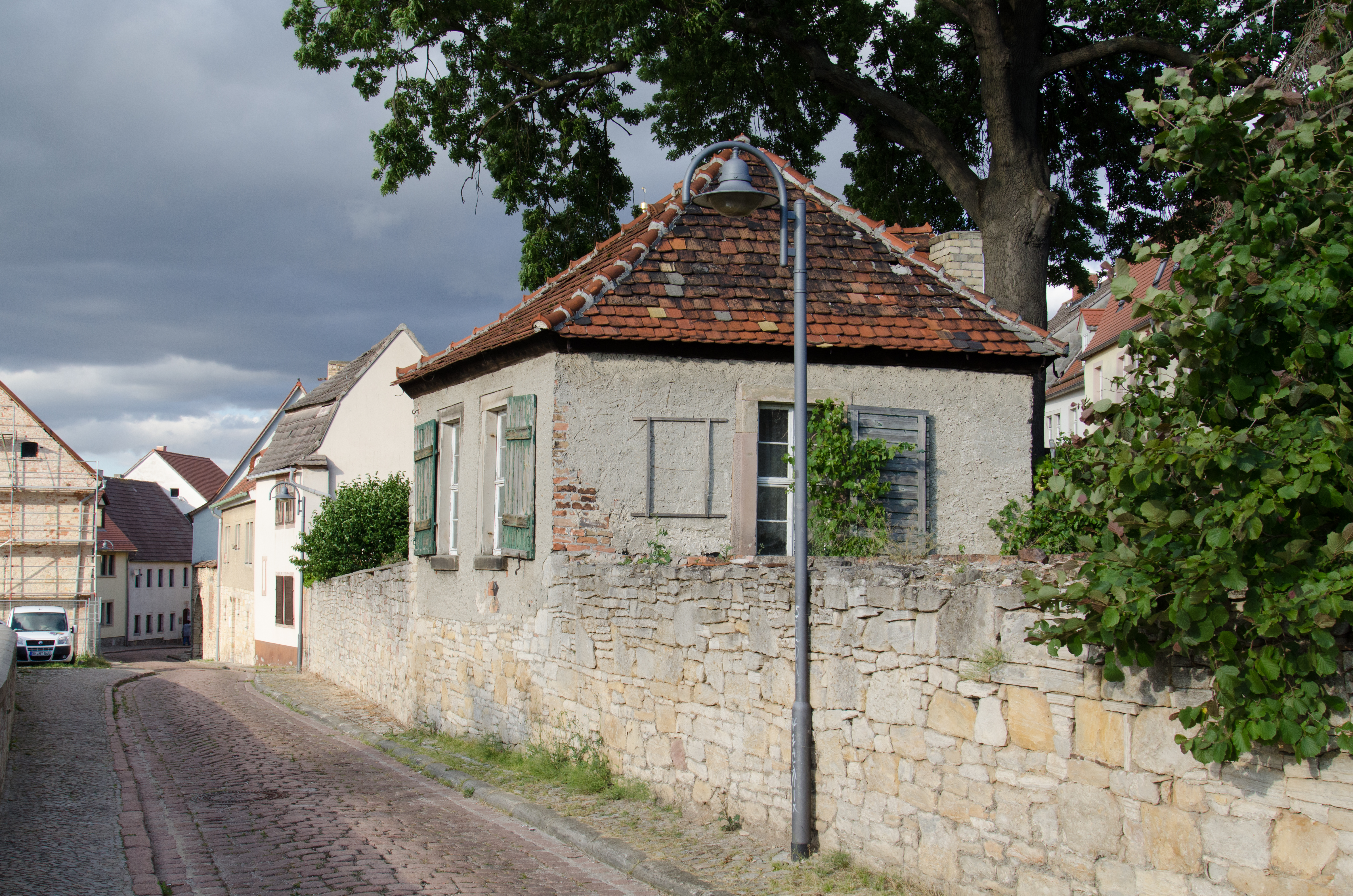 Querfurt, Burgstraße 10, 12, Gartenhaus